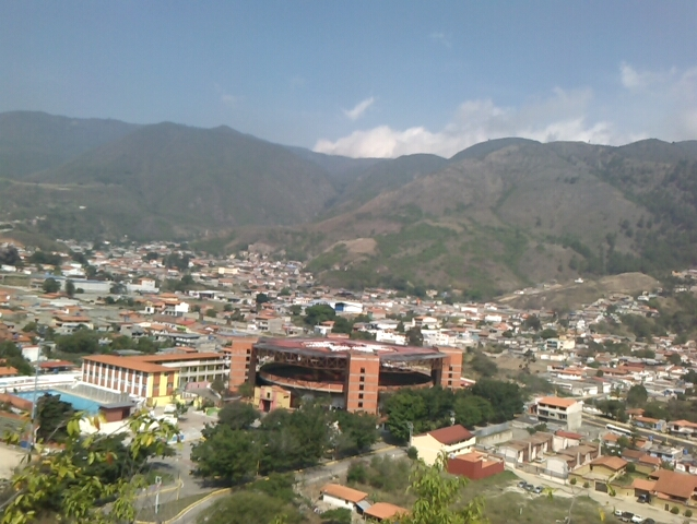 paisaje